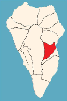 Ubicación del municipio de Breña Alta